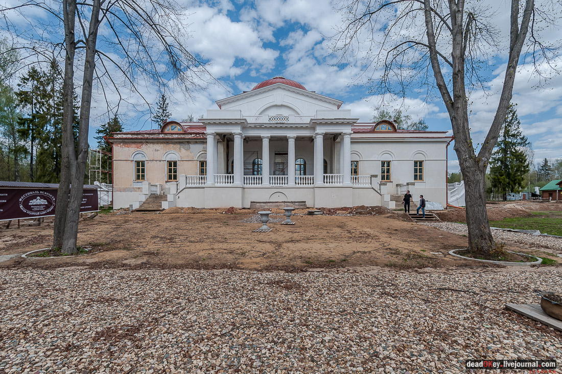 Студеные Ключи. Ивановская область, Заволжский район, деревня Порозово